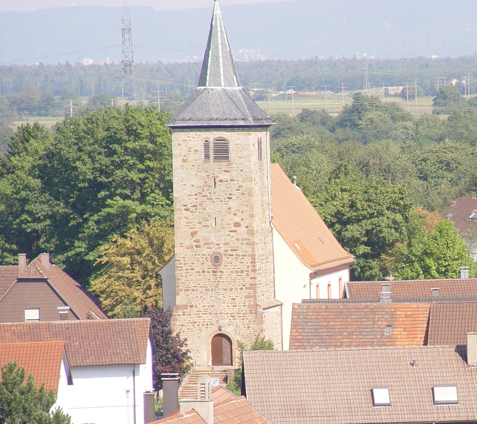 Die alte Kapelle in Bietigheim.